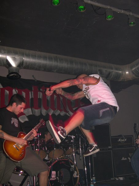 Il salto di Saverio